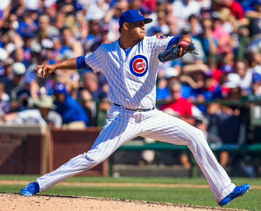 Héctor Rondón